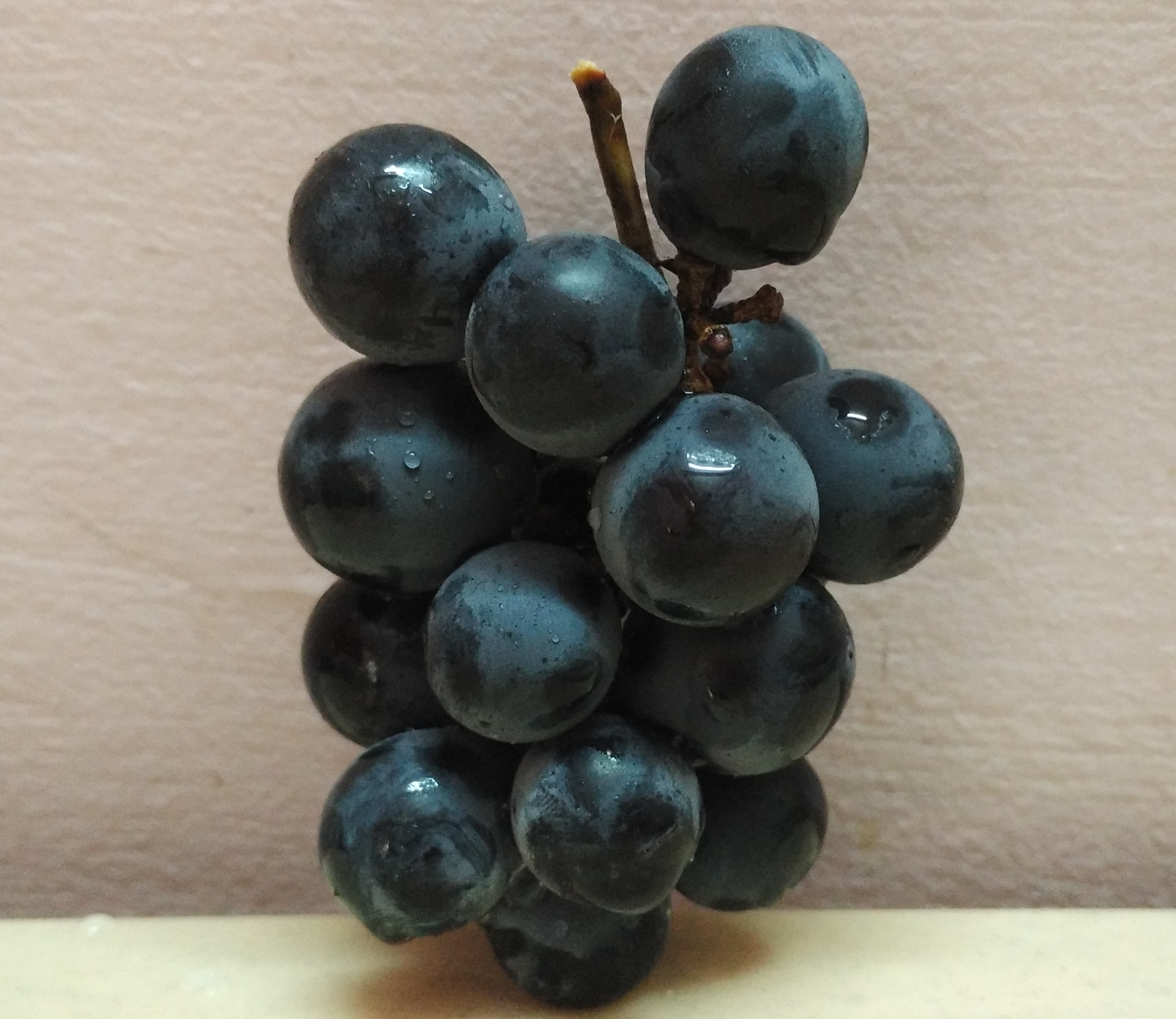 ಕನ್ನಡ: 'ಬೆಂಗಳೂರು ಬ್ಲೂ' ಜಾತಿಯ ದ್ರಾಕ್ಷಿ